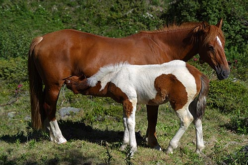 Stute und Fohlen in Gruben im Turtmanntal